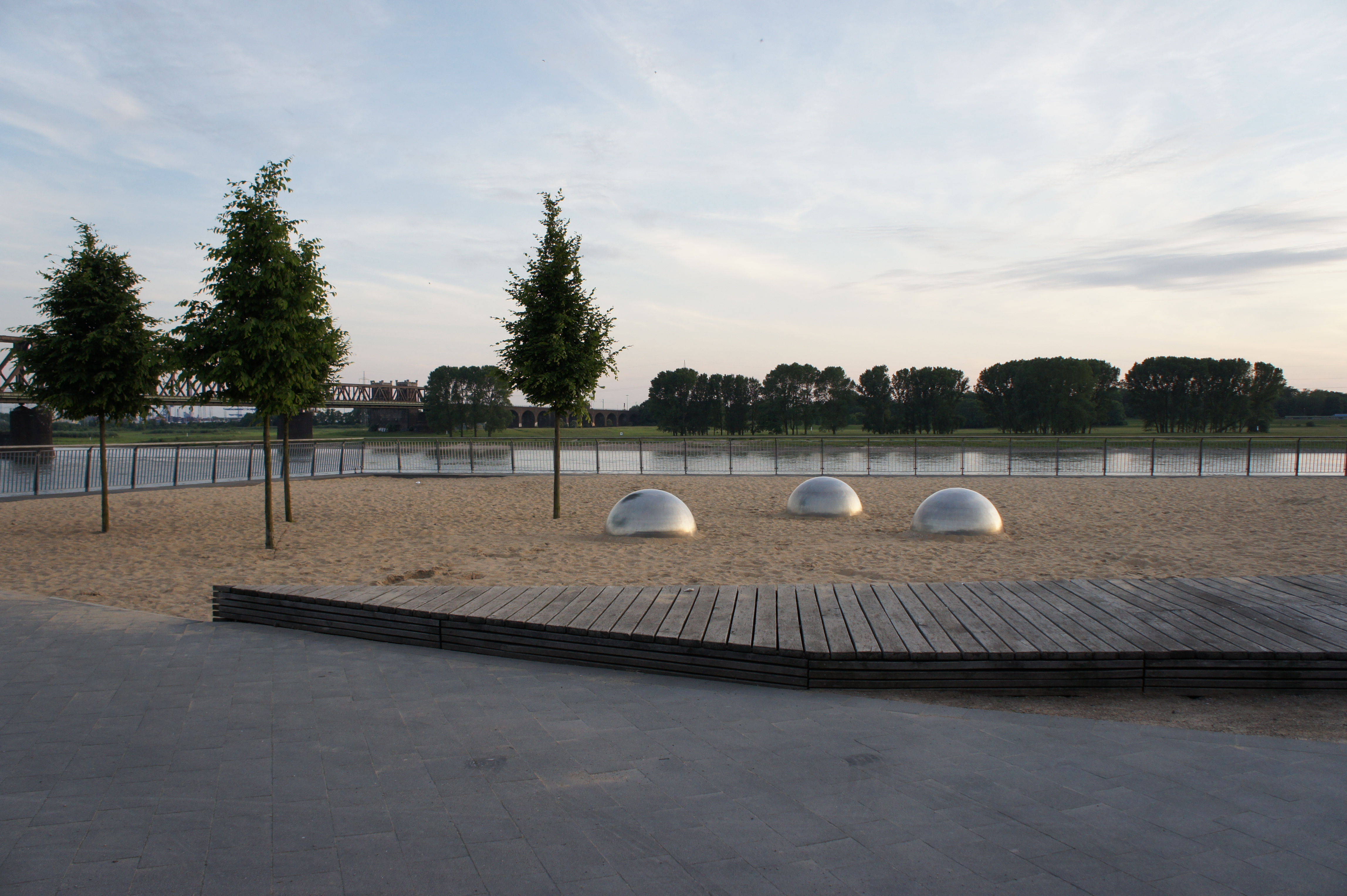 Sandstrand im Rheinpark Duisburg